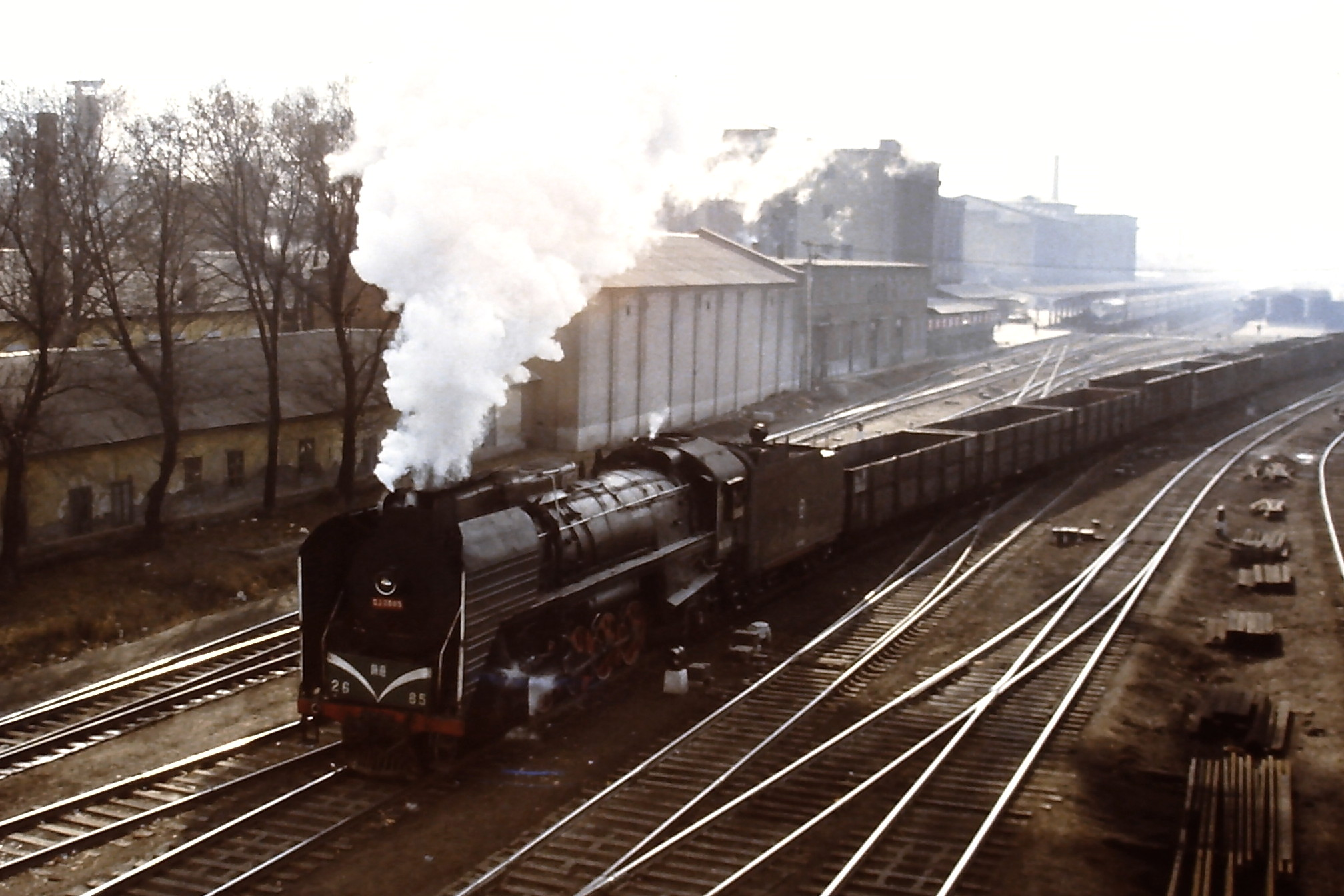 Güterzug mit QJ 2685 bei der Ausfahrt aus Harbin